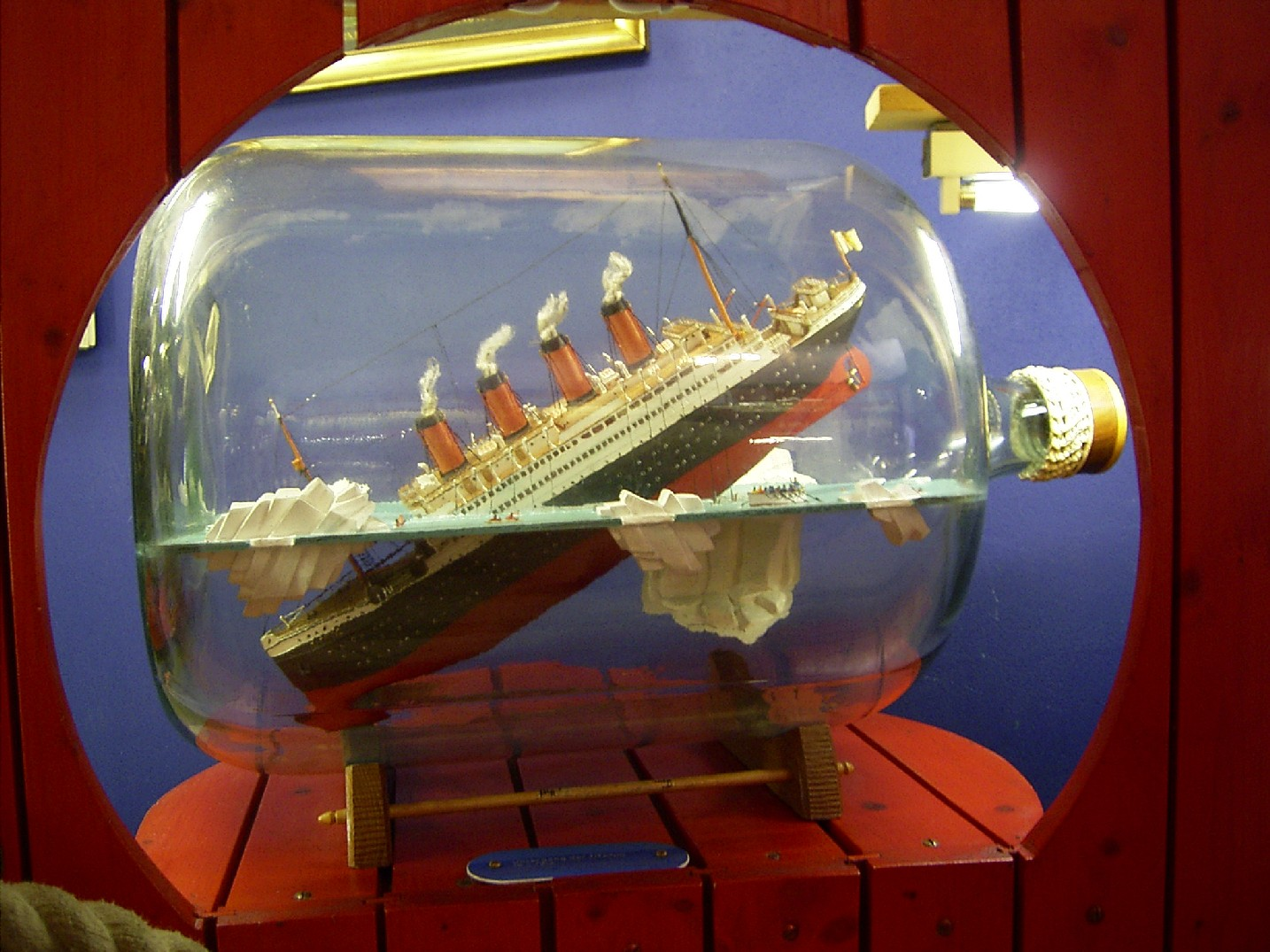 Buddelschiffdiorama, das den Untergang der Titanic darstellen soll im Buddelschiffmuseum Neuharlingersiel